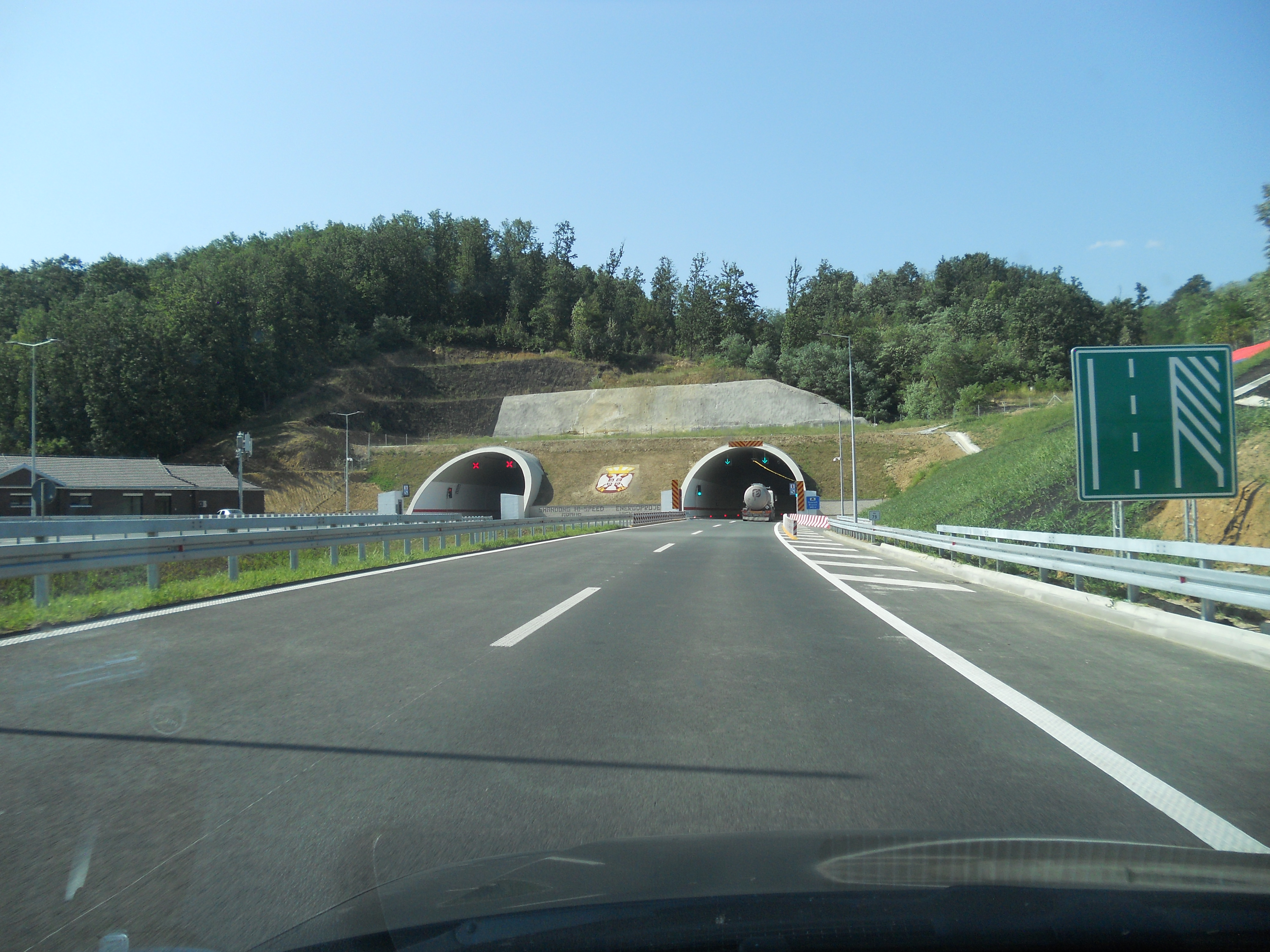 Auto-put Miloš Veliki